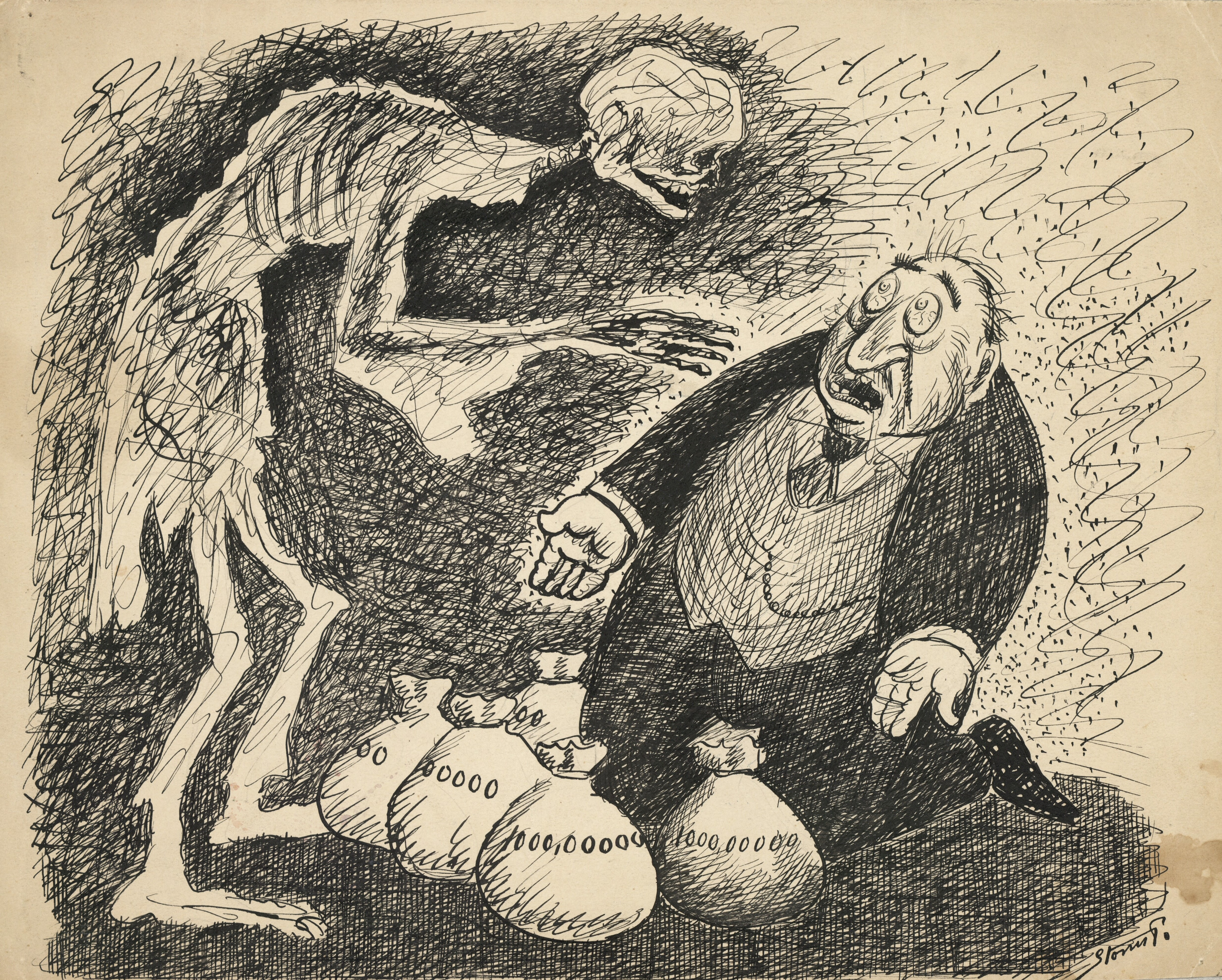 Gullaschbaron tegnet af Storm P. (Robert Storm Petersen).